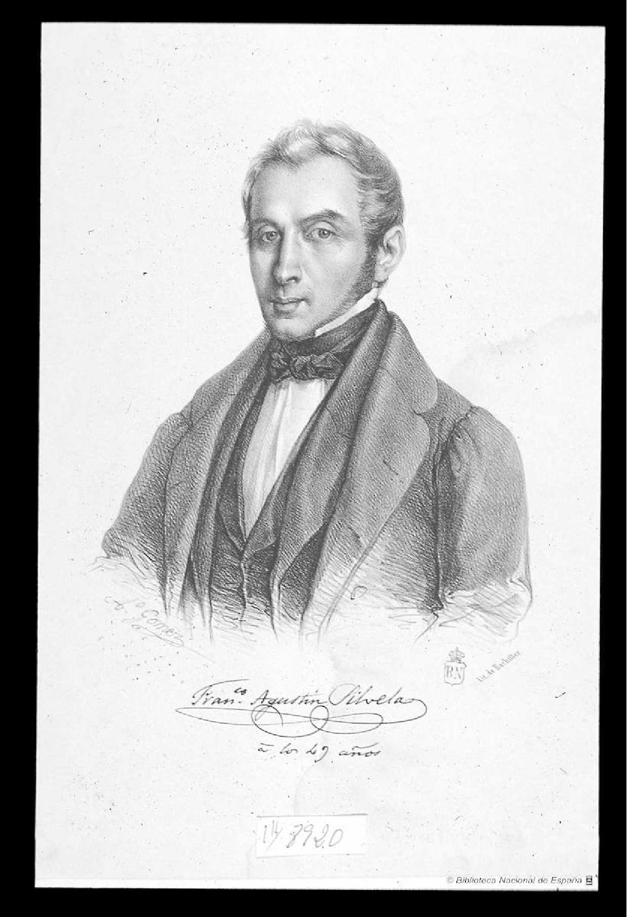 Retrato de Francisco Agustín Silvela, a los 49 años, litografía Bachiller